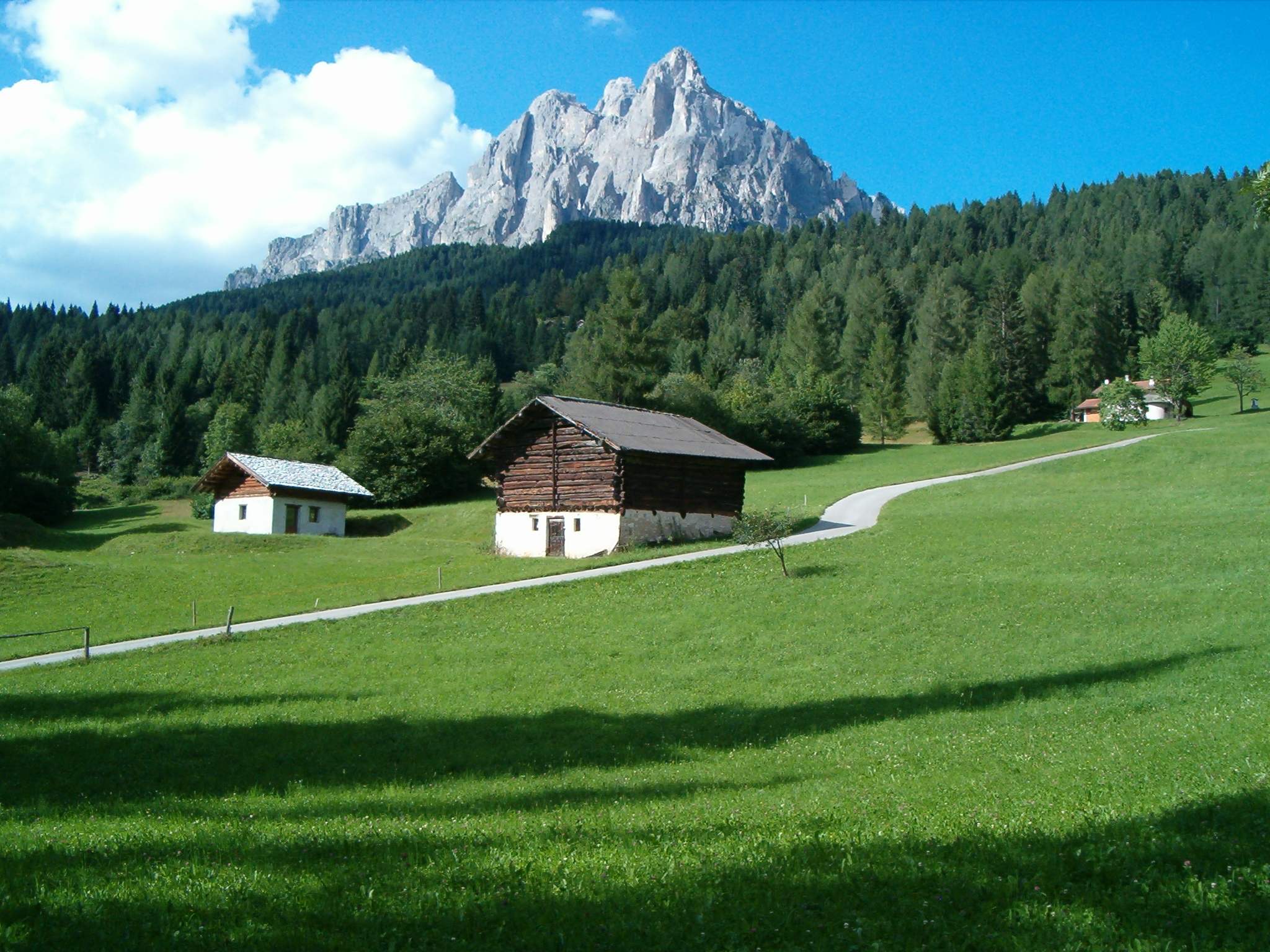 Prati Strine and Pale di San Martino, Primiero, Trentino, Italy